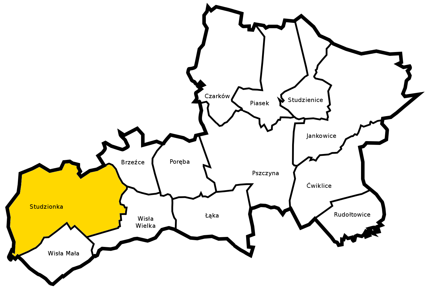 Gmina Pszczyna - sołectwo Studzionka